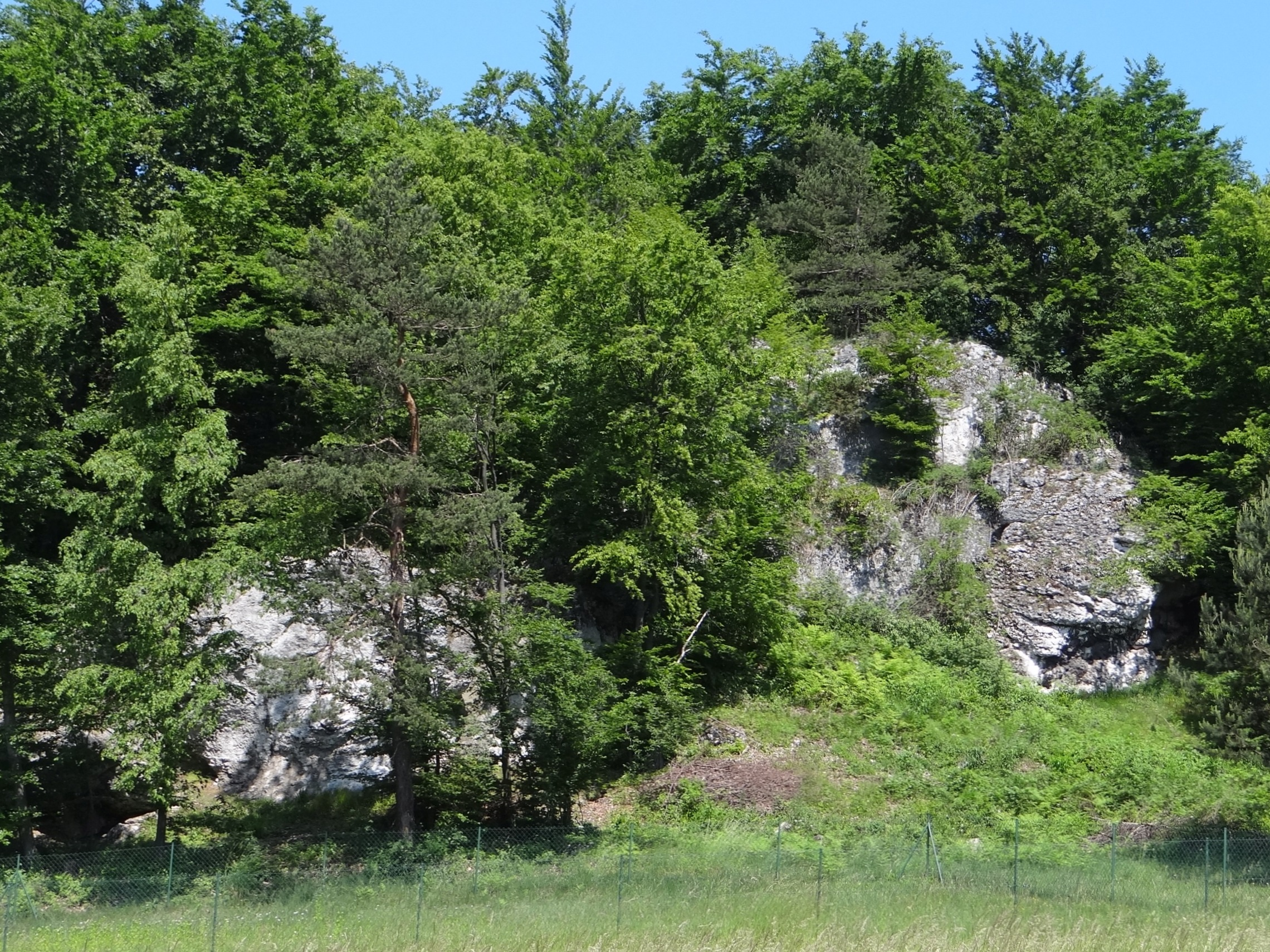 Skałki w Ryczowie